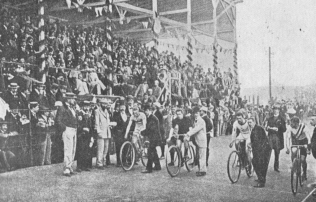 Bahn-Weltmeisterschaften 18. August 1895 in Köln: Start des Rennens über die Meile der Amateure, v.l.n.r.: Wilhelm Henie, Jean Schaaf, Christian Ingemann Petersen, Jaap Eden